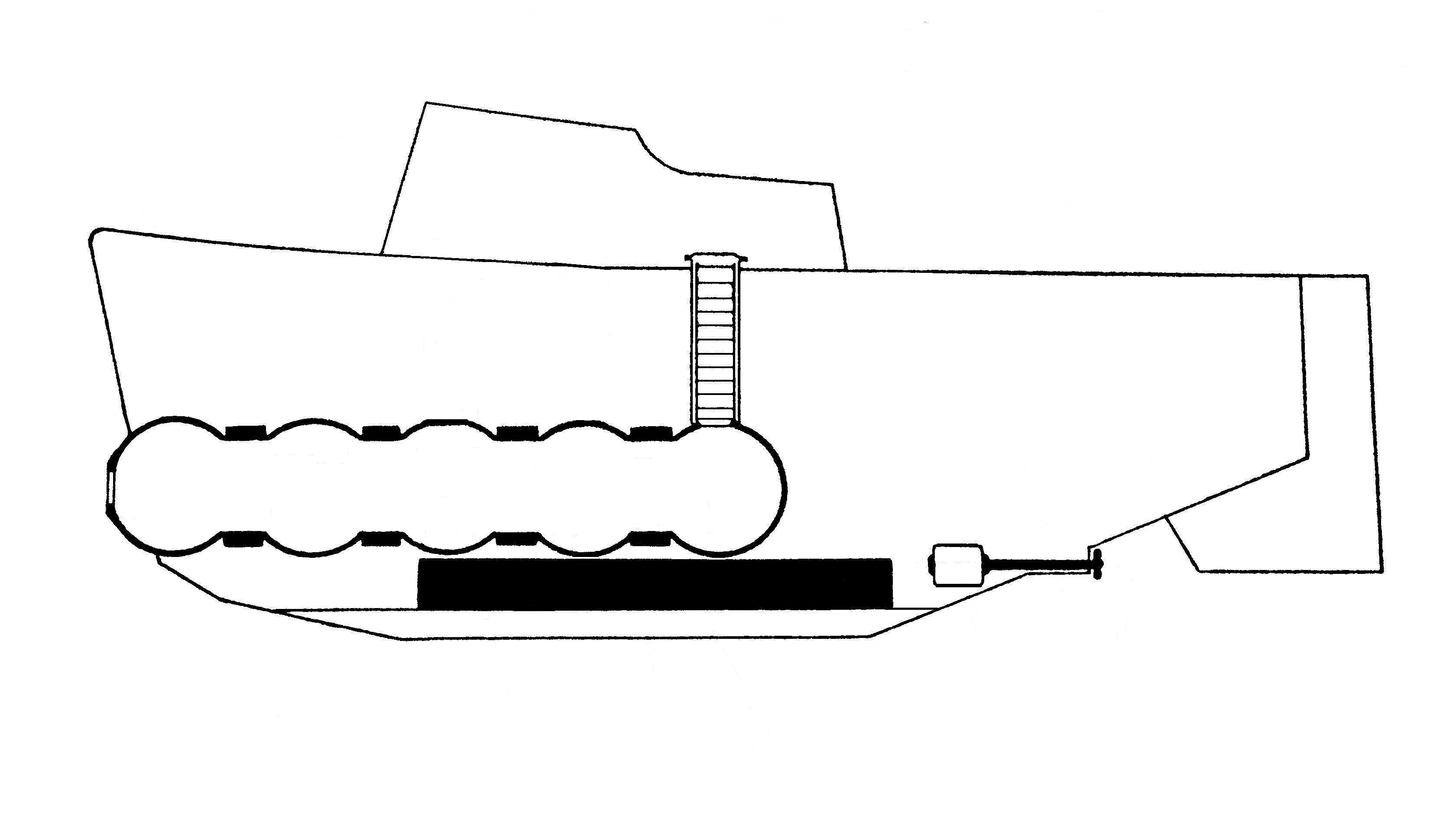 Глубоководный аппарат с полисферическим прочным корпусом